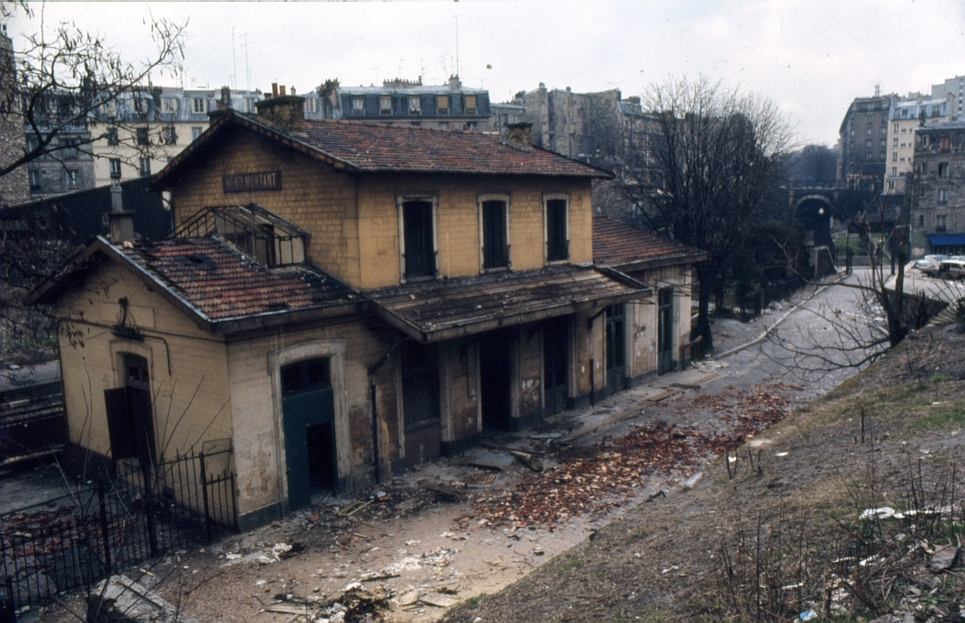 La gare de Ménilmontant, Paris (20e), côté ville, en 1971.